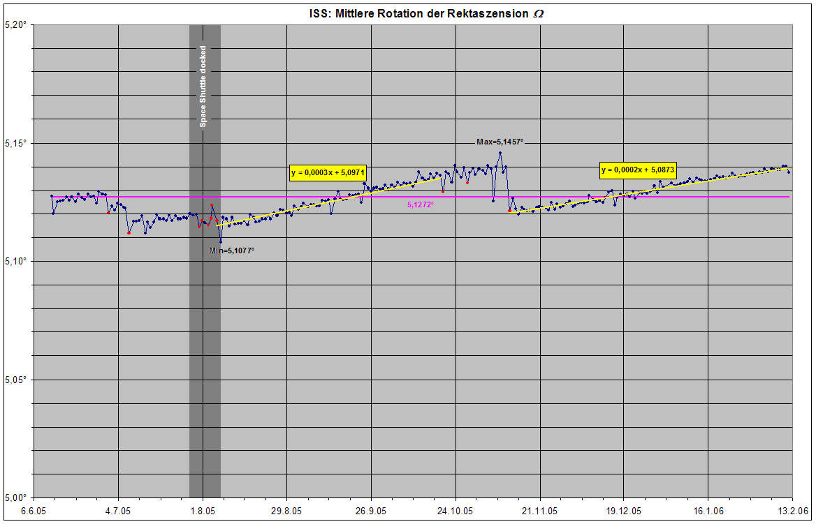 Internationale Raumstation: Verlauf der mittleren Roation der Rektaszension